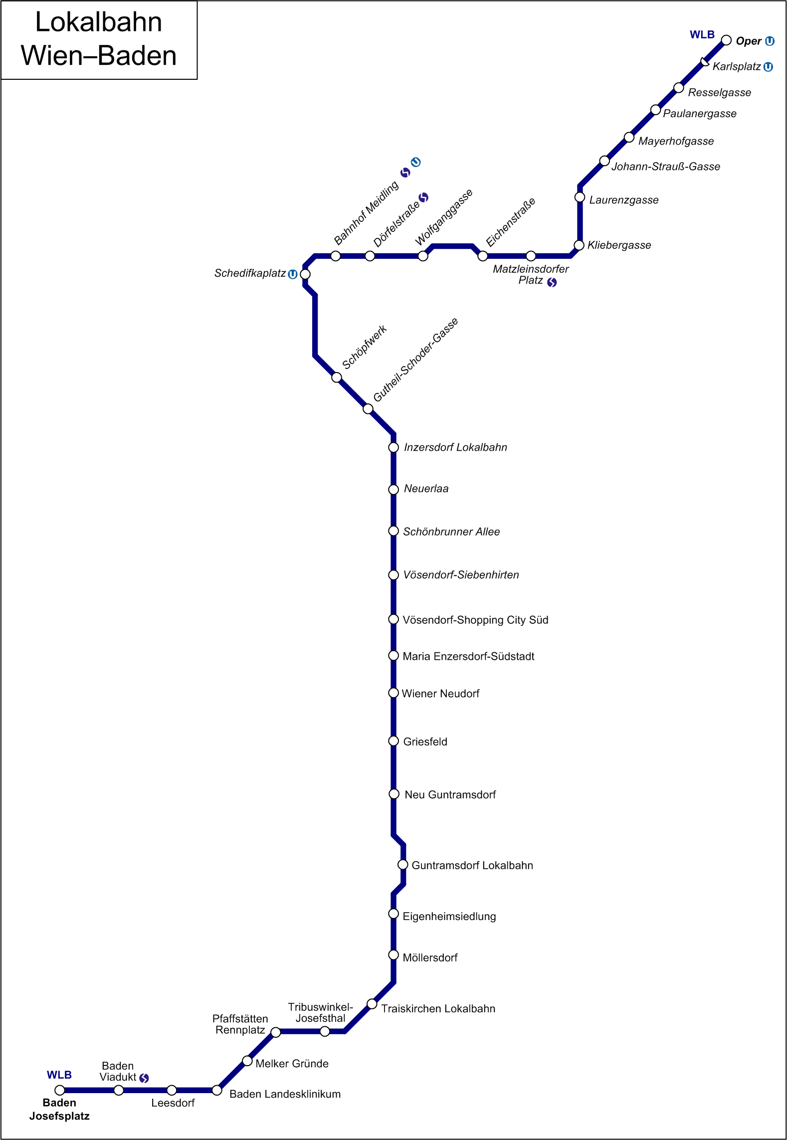 Lokalbahn Wien-Baden Stationen in der Kernzone 100 (Wien) in kursiv